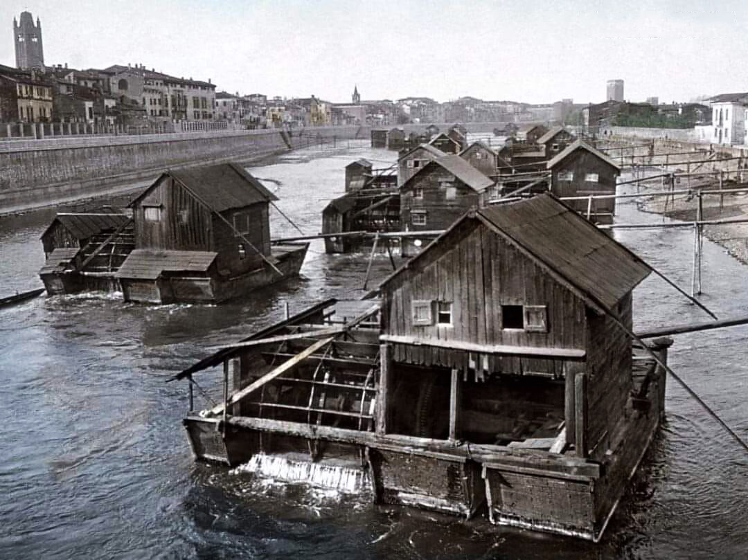 Mulini sull'Adige a Verona, in una fotografia scattata nel 1897